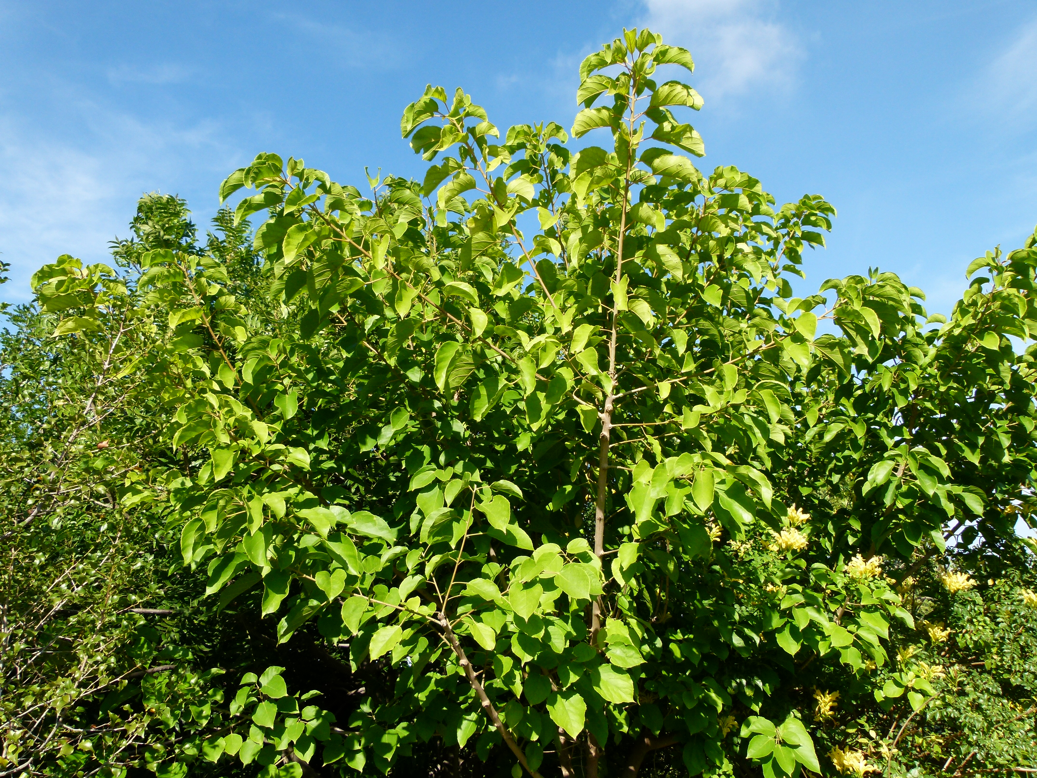 Jardin botanique de Barcelone